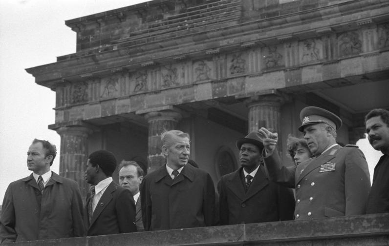 Berlin, Staatsoberhaupt Angolas an der Grenze ADN-ZB/14.10.81/Berlin/Staatsbesuch/Das Staatsoberhaupt Angolas, Jose Eduardo dos Santos (5.v.l.), besuchte in Begleitung von Wolfgang Rauchfuß die Staatsgrenze der DDR zu Westberlin am Brandenburger Tor, wo Generalleutnant Karl-Heinz Drews (2.v.r.) die Grüße aller Angehörigen der Grenztruppen der DDR überbrachte. Abgebildete Personen: Santos, Jose Eduardo dos: Präsident, Präsident der Partei der Arbeit, Angola Rauchfuß, Wolfgang: stellvertretender Ministerratsvorsitzender, Minister für Materialwirtschaft, DDR Drews, Karl-Heinz: Generalleutnant der Grenztruppen, Stadtkommandant Berlin, DDR